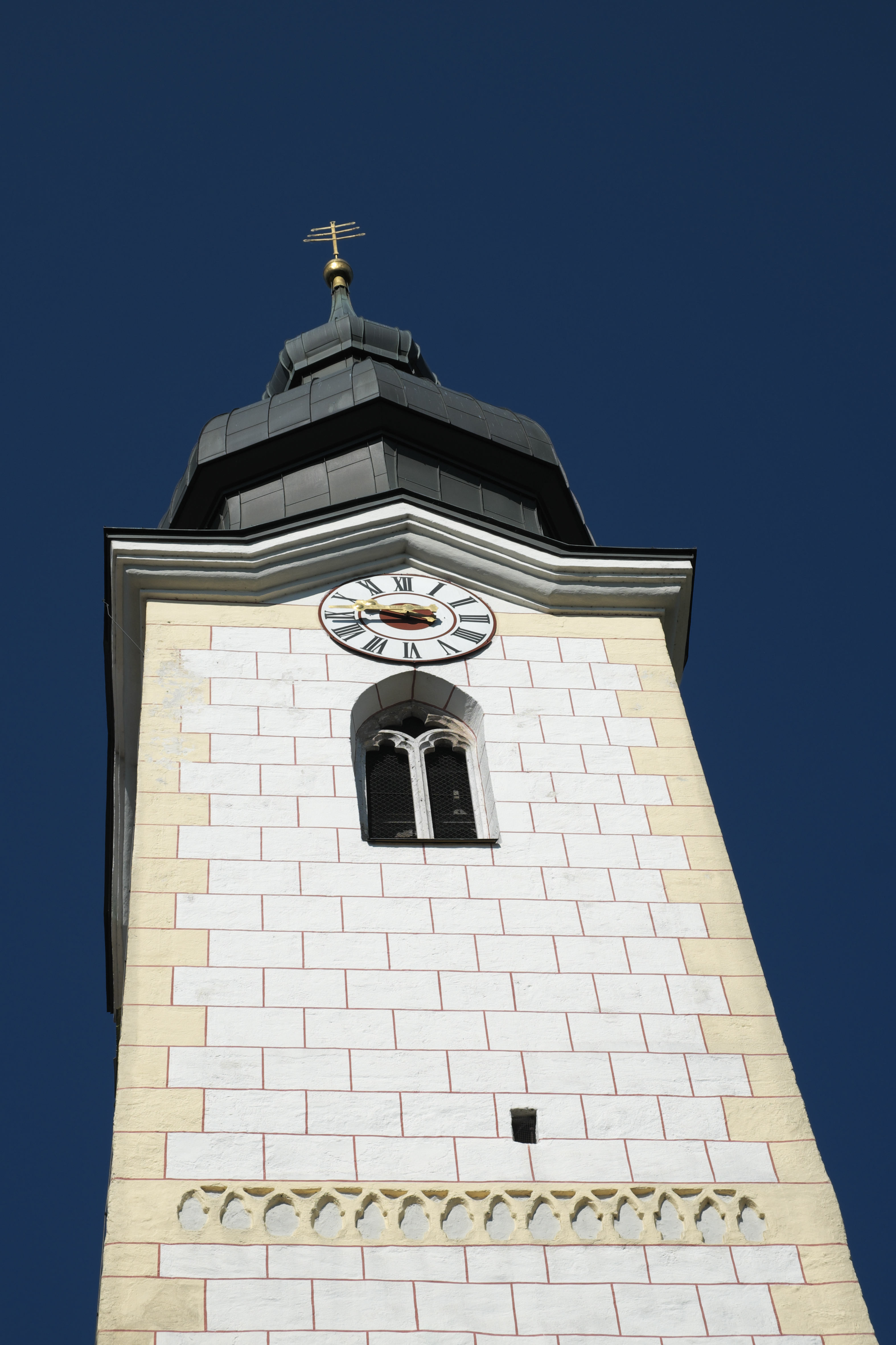 Katholische Pfarrkirche St. Rupertus in Eiselfing im Landkreis Rosenheim (Bayern/Deutschland), um 1500, Turmhaube von 1800, Blendbogenfries am Turm